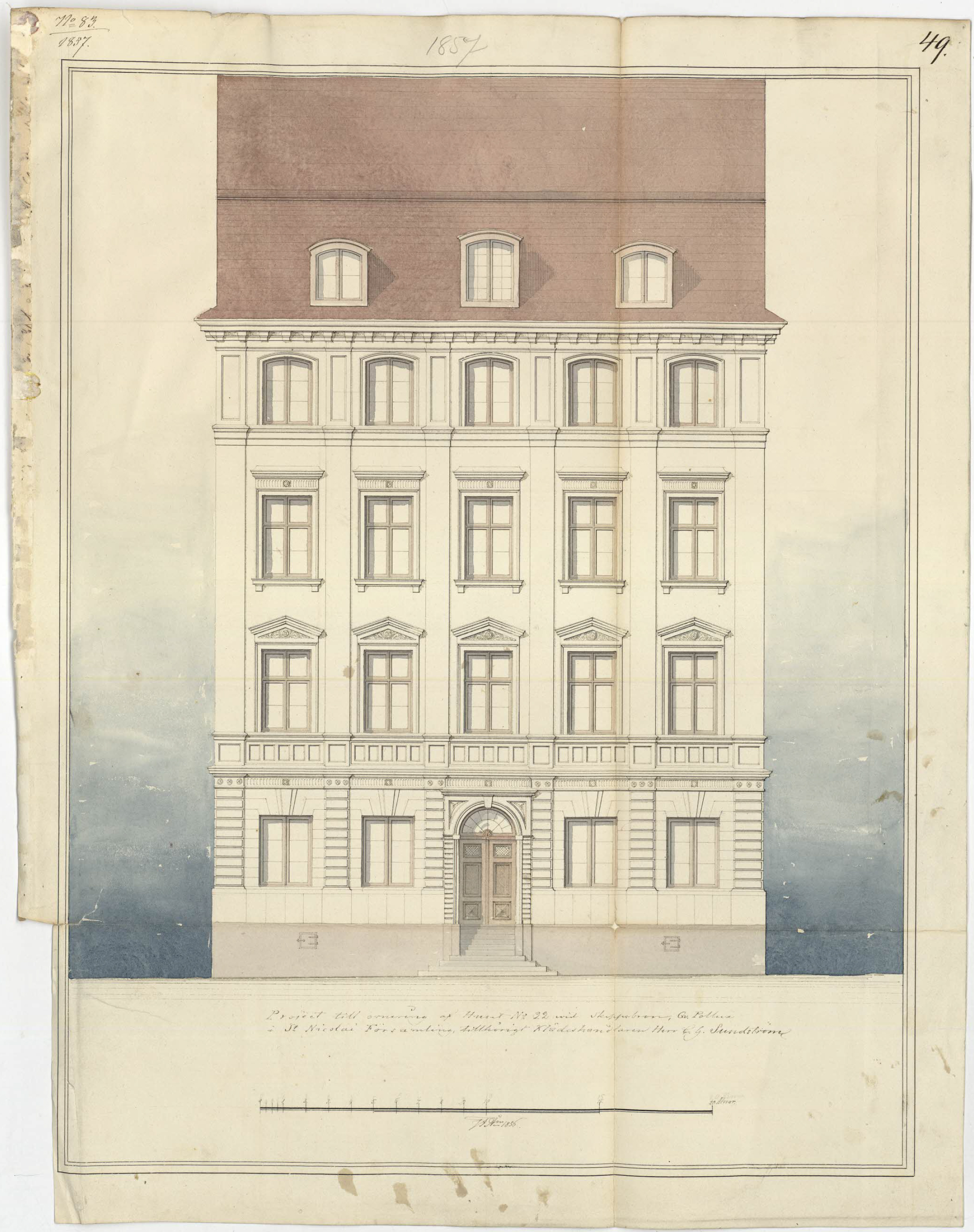 Hobelinska huset, Skeppsbron, Stockholm, fasadritning 1860